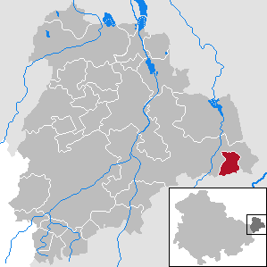 Göpfersdorf in Thuringia - District Altenburger Land